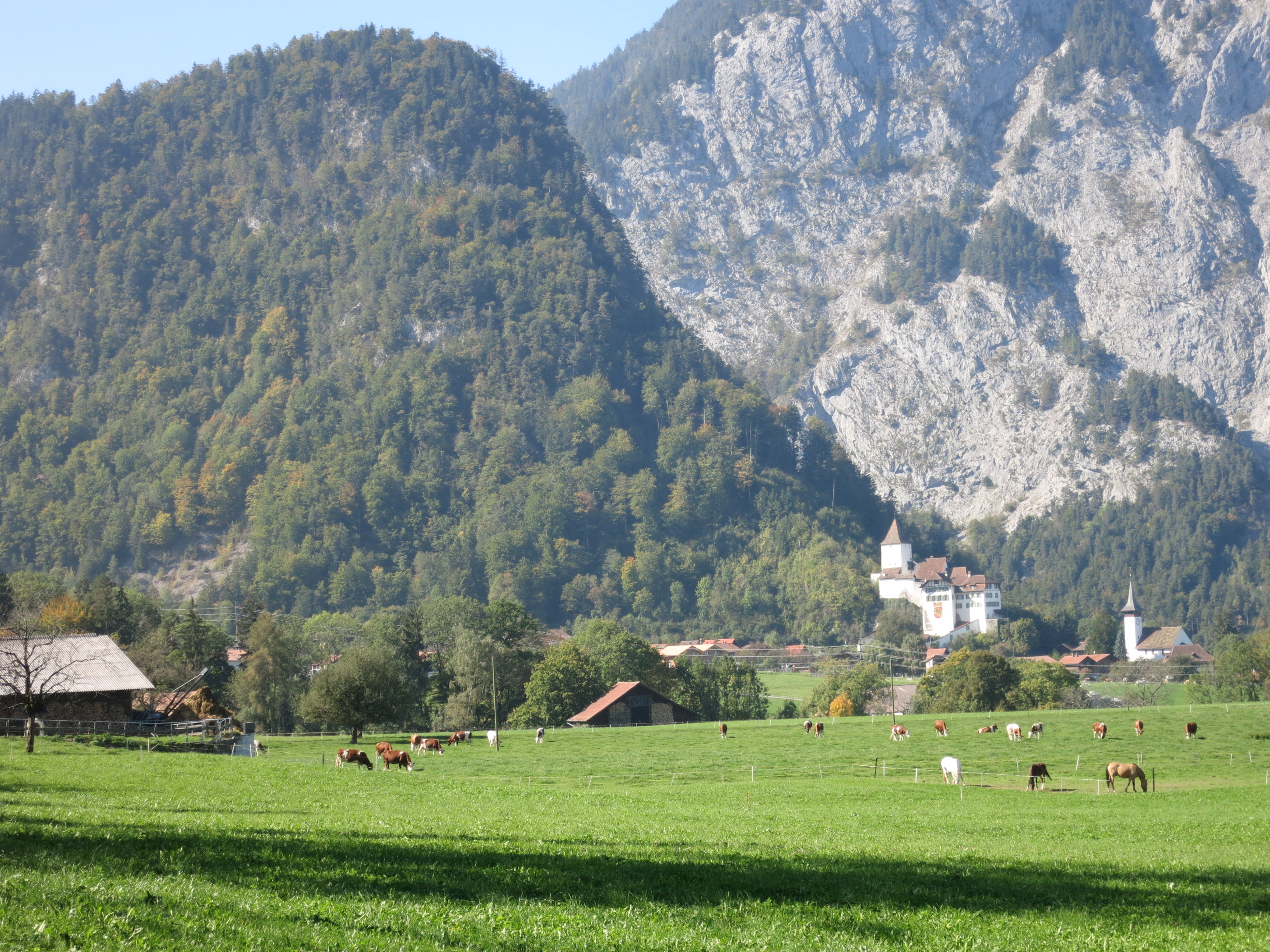 Sperrstelle Wimmis BE, Schweiz